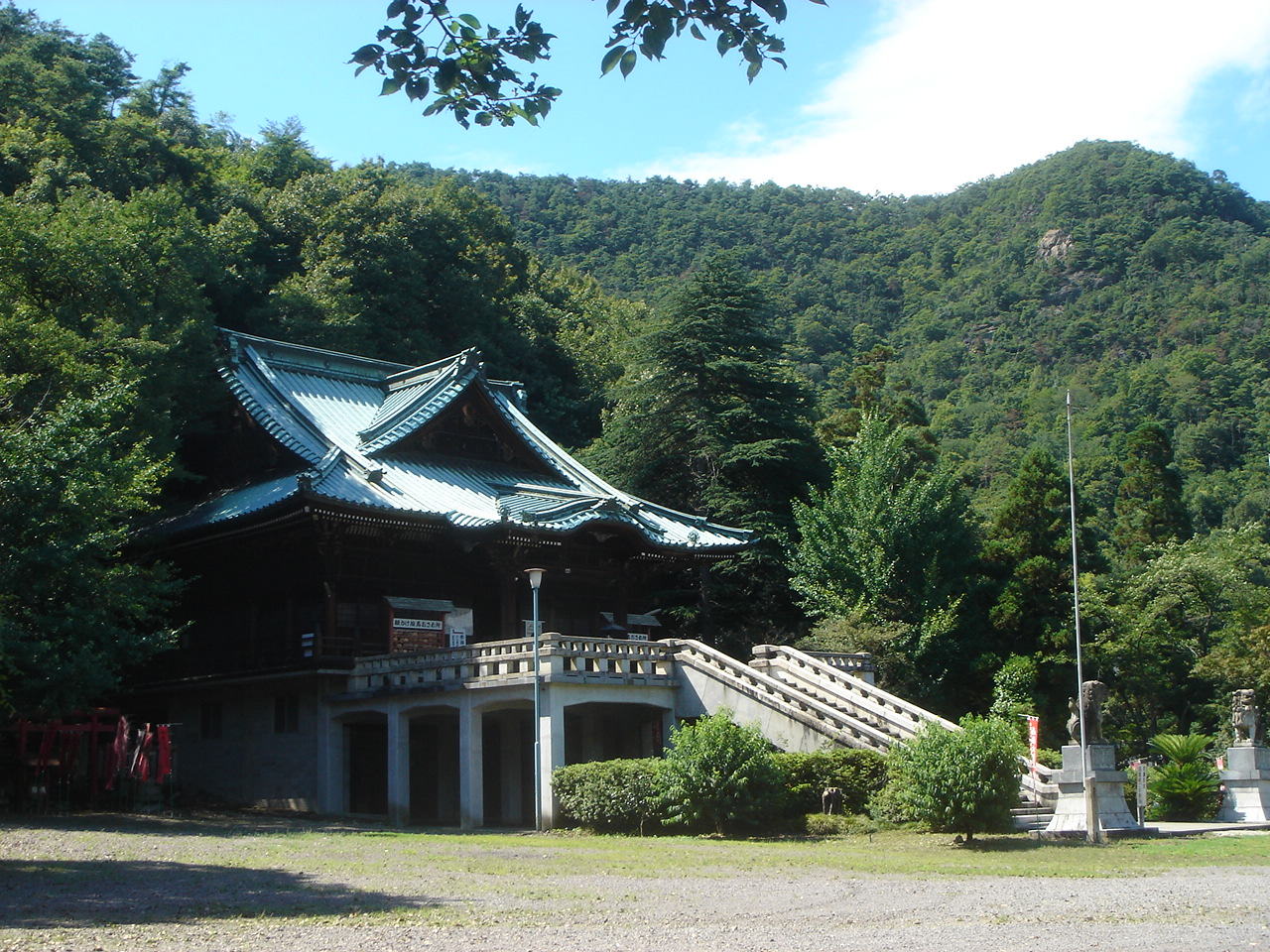 Teishoji(貞照寺の本堂),Kakamigahara,Gifu,Japan(岐阜県各務原市)で撮影。